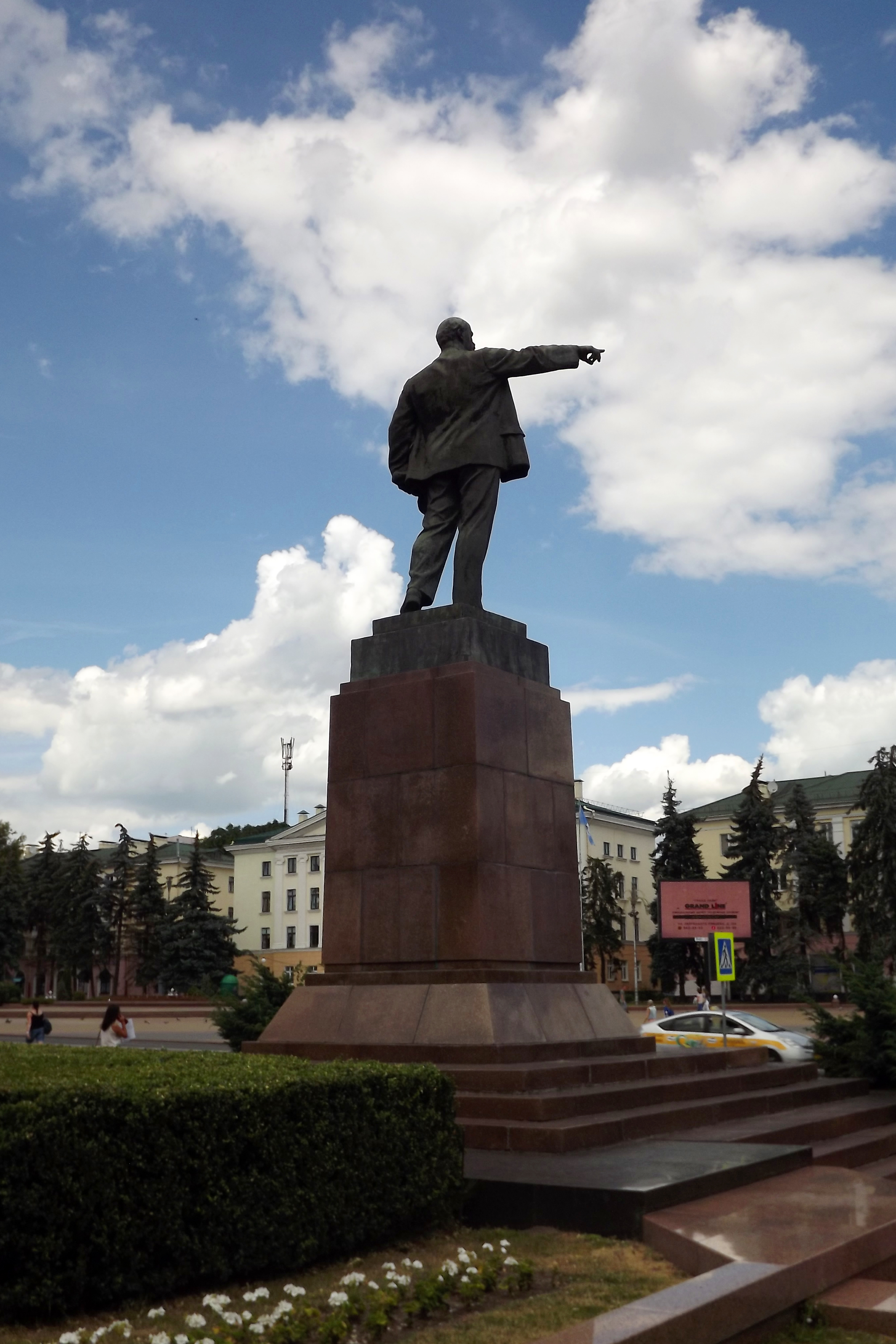 Помнік Уладзіміру Леніну, г. Брэст, Беларусь